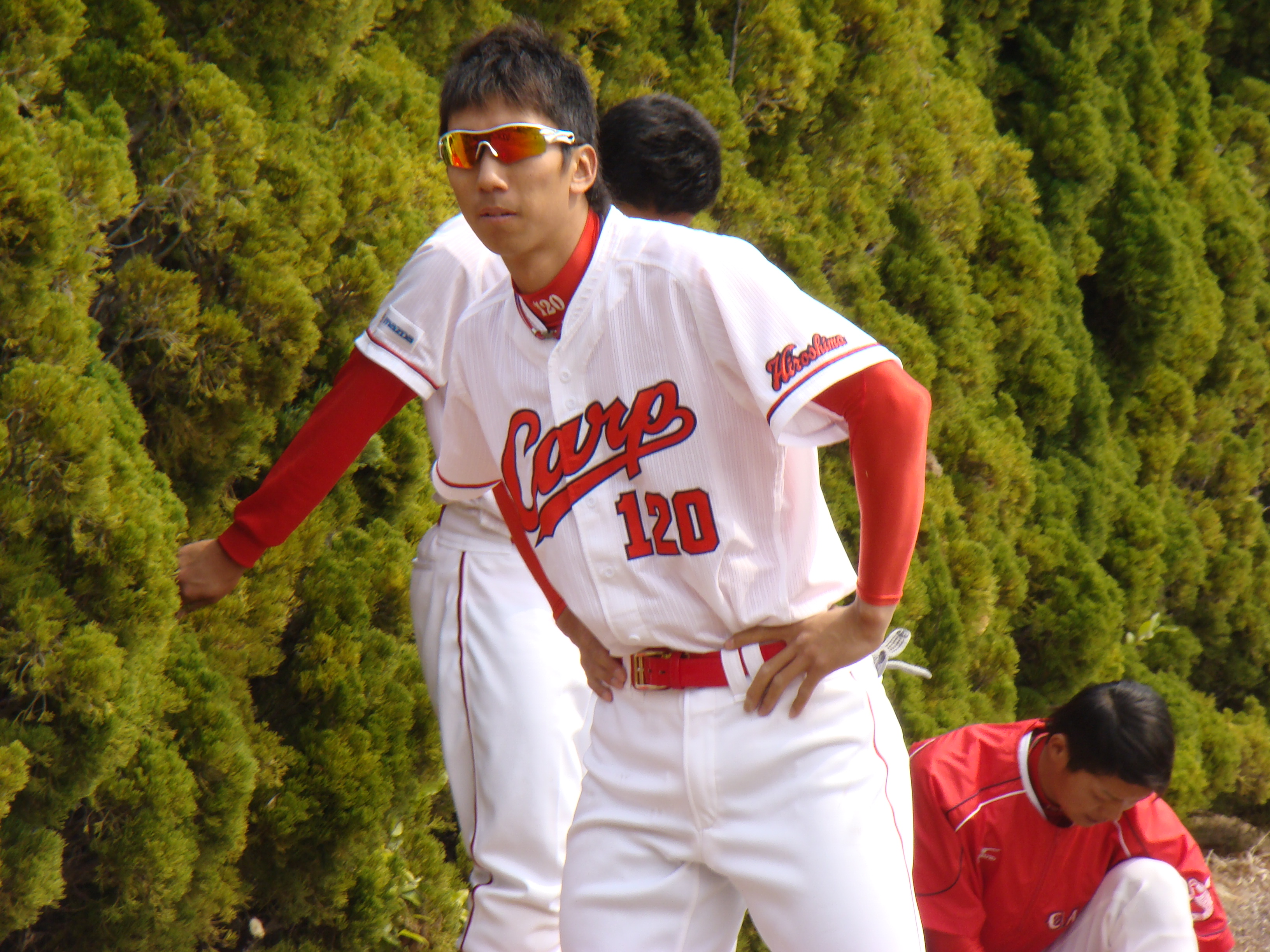 2011年の3月に撮った，ランニングをしている永川光浩選手の画像